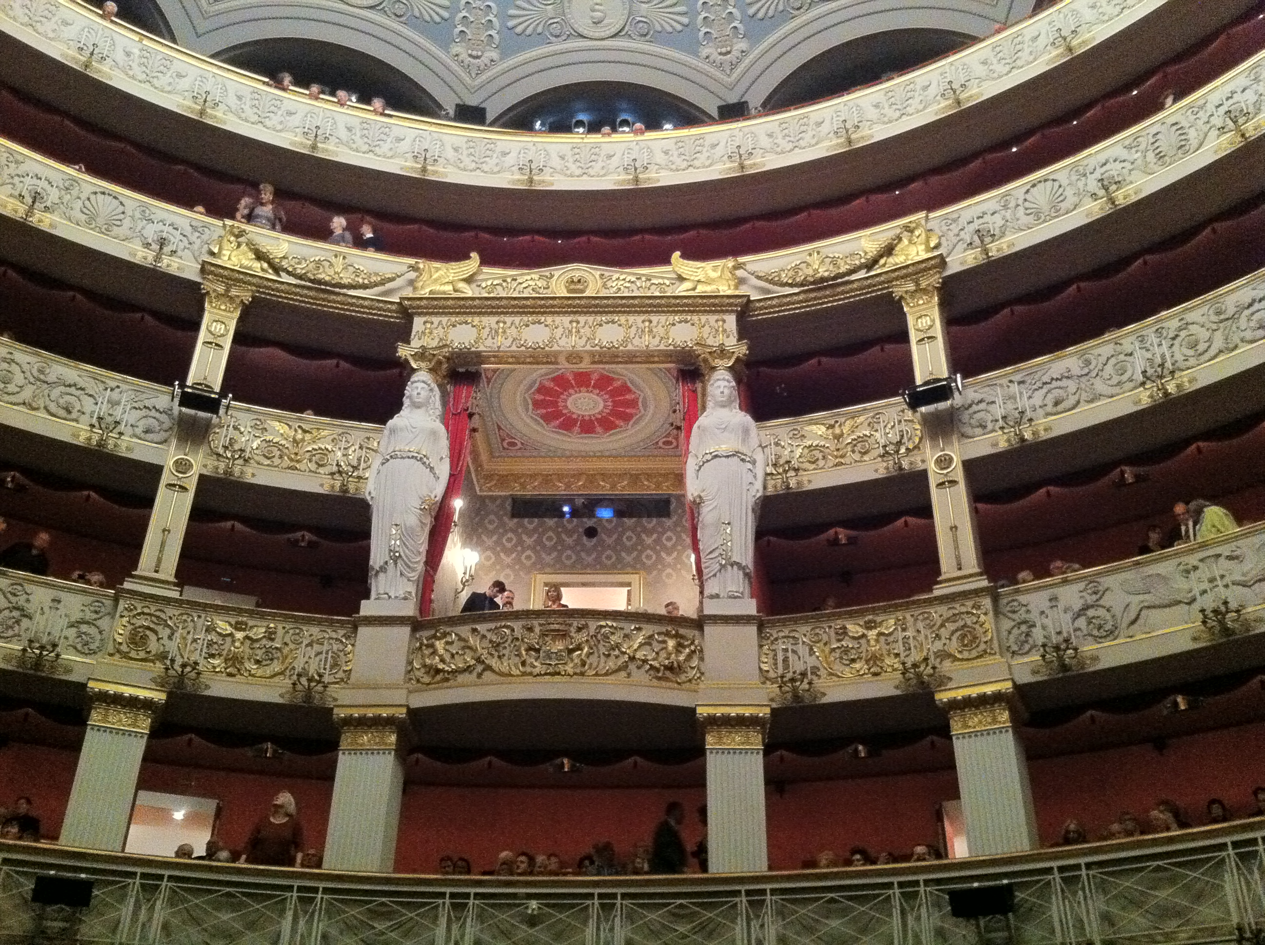 Nationaltheater München